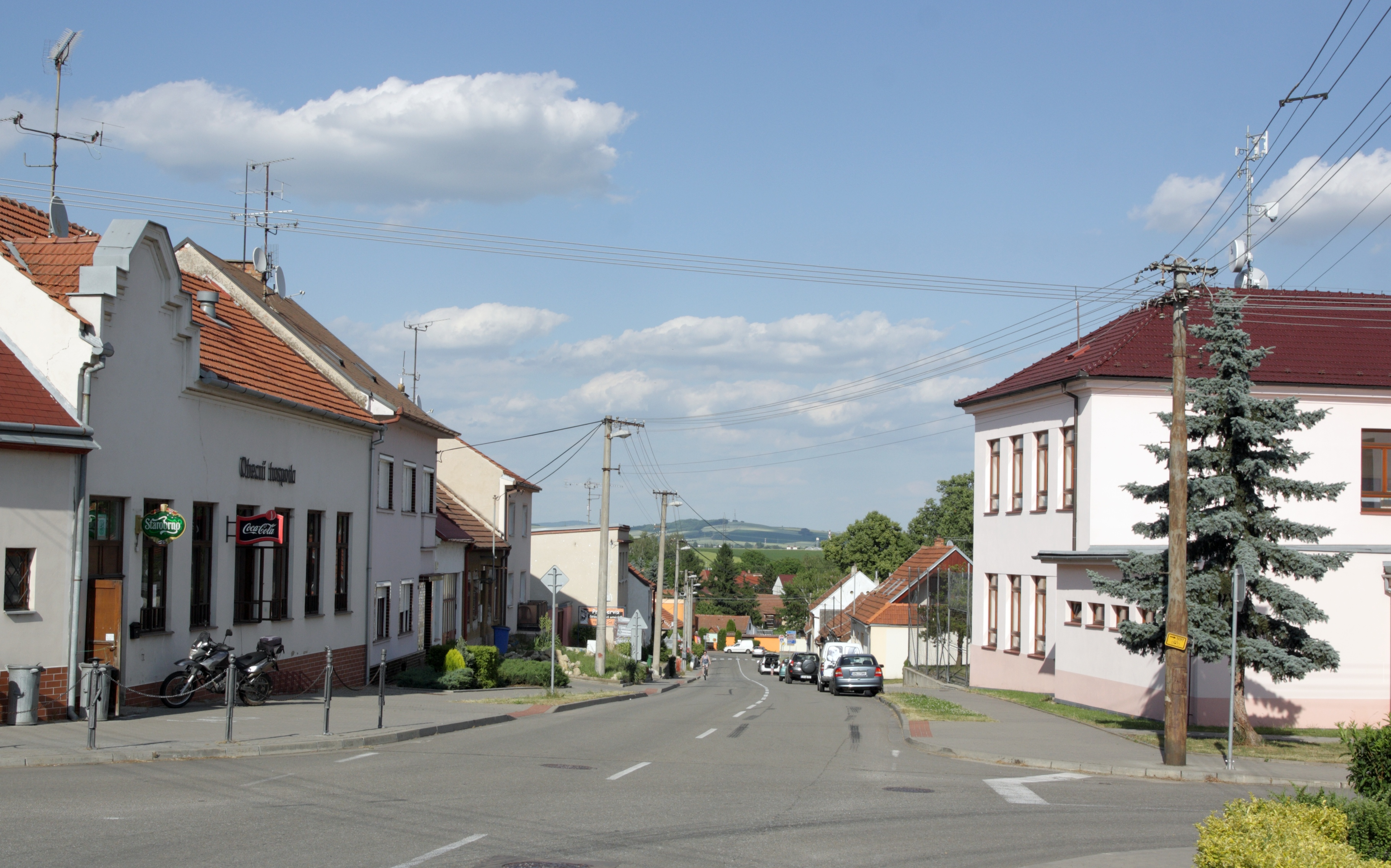 Křenovice (okres Vyškov) - křižovatka Brněnská a Školní.